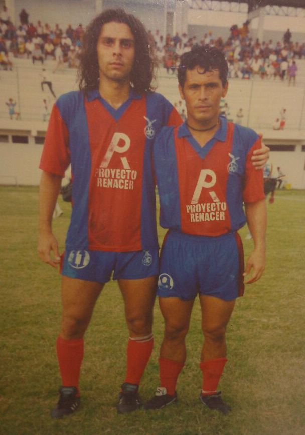 Marcelo Messina al lado del punta Tonny Torres, en el Dep. Quevedo ecuatoriano.